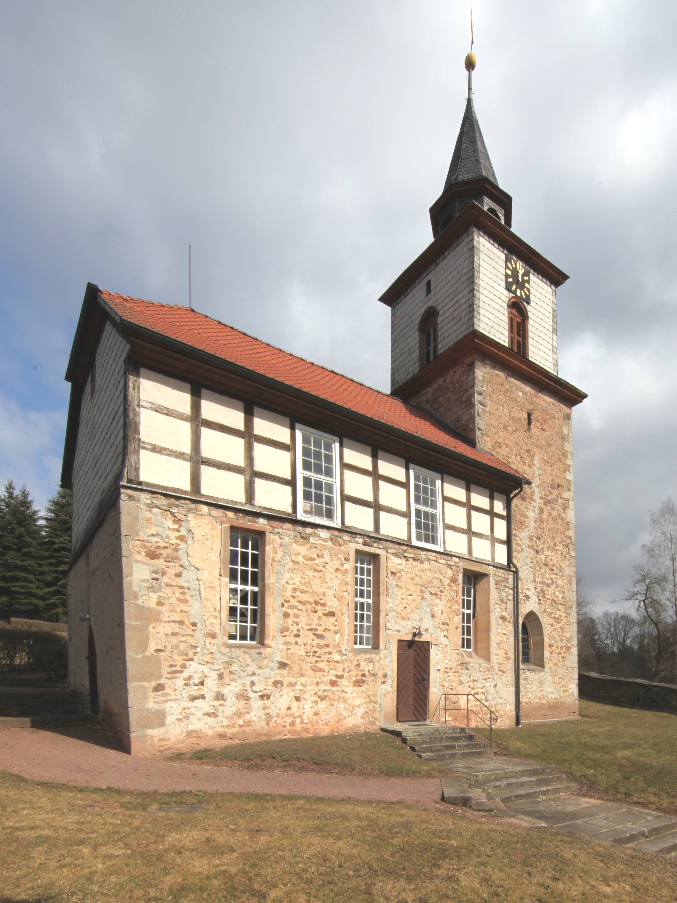 Evangelisch-Lutherische Kirche St. Marien in Ebenhards, OT von Hildburghausen